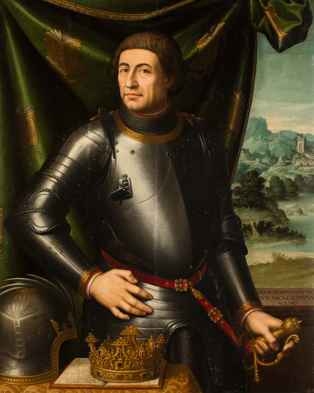 La obra representa al rey aragonés, Alfonso V de Aragón (1416-1458), vestido con armadura de época de Carlos I de Aragón. En primer término, encima de la mesa, se presentan objetos significativos: corona (rey), yelmo (conquistador) y libro abierto (cultura). A través del ventanal se observa un paisaje con ruinas romanas, y se ha postulado que aparece el Castel Nuovo de Nápoles, residencia del rey de Aragón tras su conquista de Nápoles.